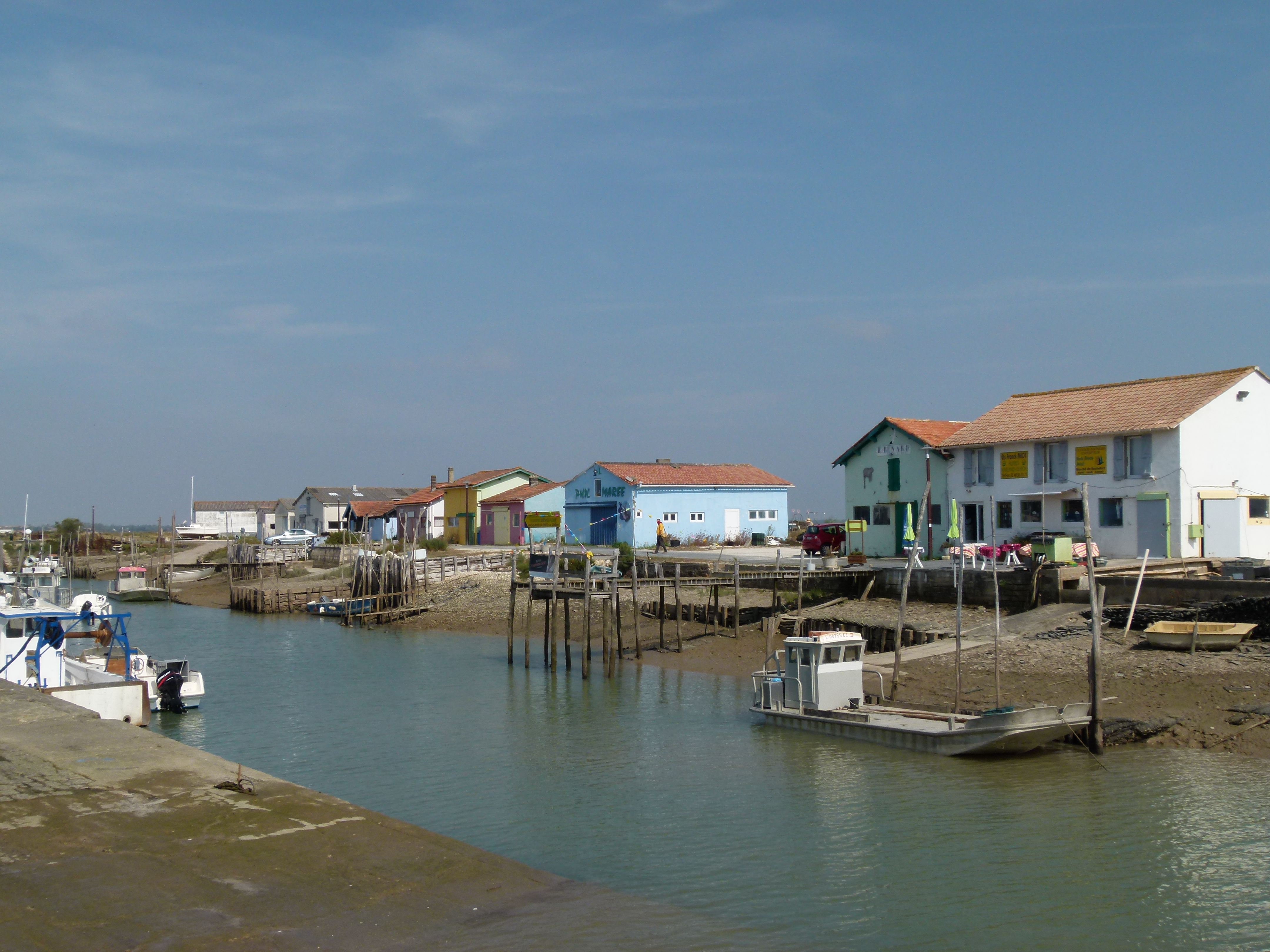 Le site du port ostréicole de La Cayenne à Marennes (Charente-Maritime).